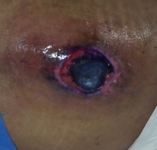 Ulcera por presión en escapula 29/11/2015